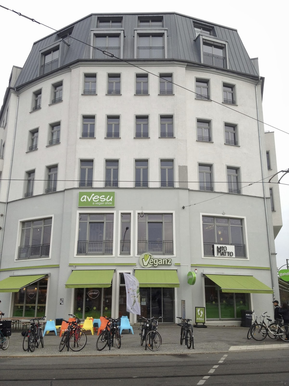 Veganz, Warschauer Straße 33, Berlin